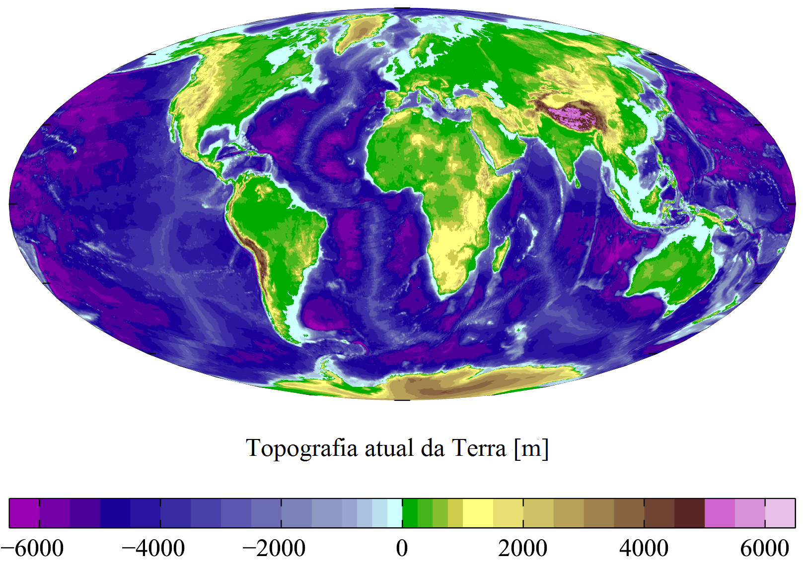 Altimetria e batimetria atuais daTerra com resolução horizontal de 15 minutos. Derivado do TerrainBase Digital Terrain Model (v1.0) National Geophysical Data Center. Os dados originais têm resolução de 5 minutos. Aqui está desenhado usando a It is plotted here using a projeção de Mollweide (usando MATLAB e o pacote M_Map).